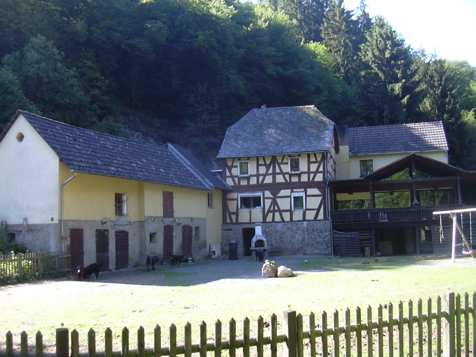 Fockenbach Mill, Fockenbach Valley, Westerwald/Germany